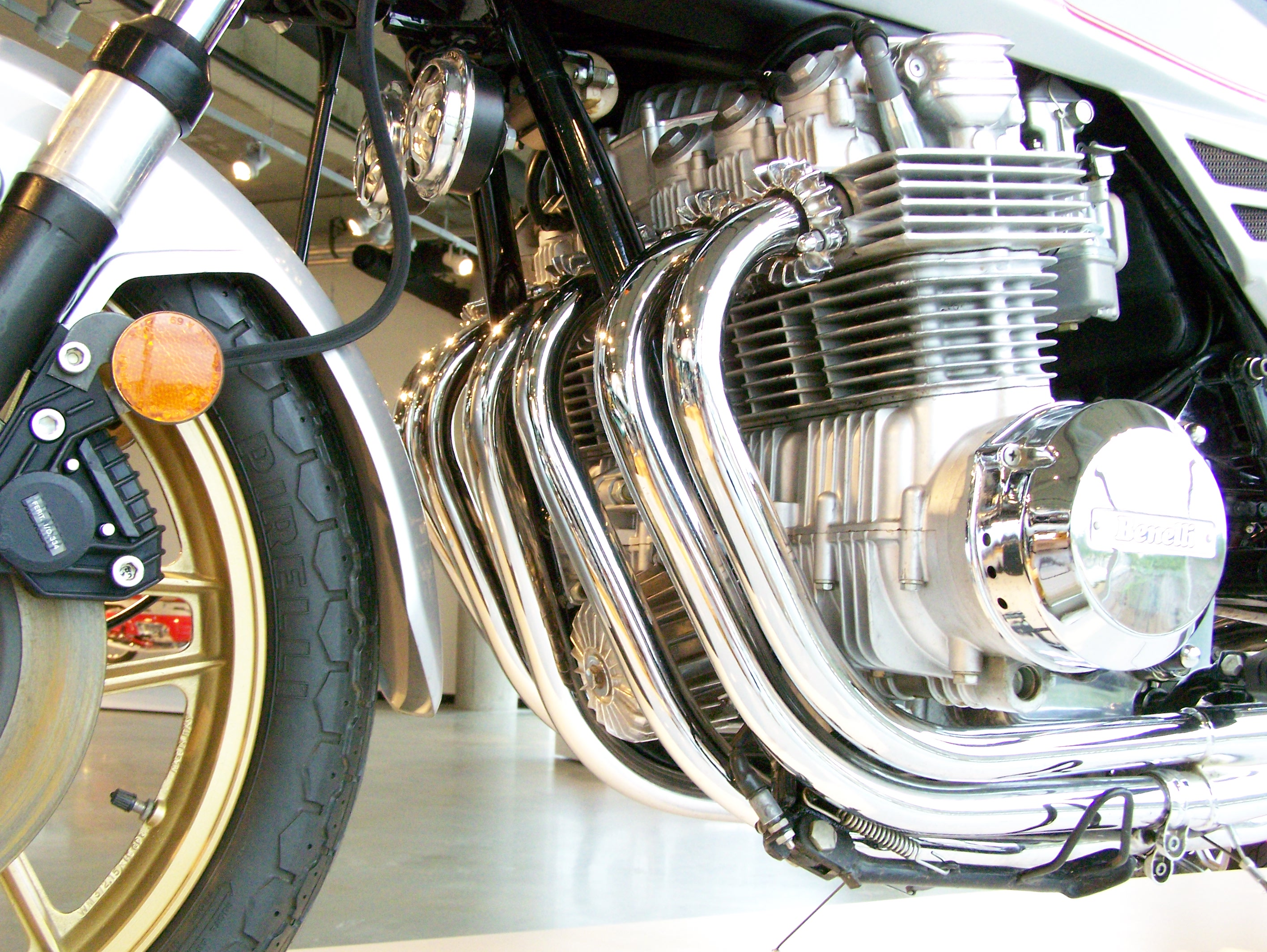 Benelli Sei Engine @ Barber Vintage Museum